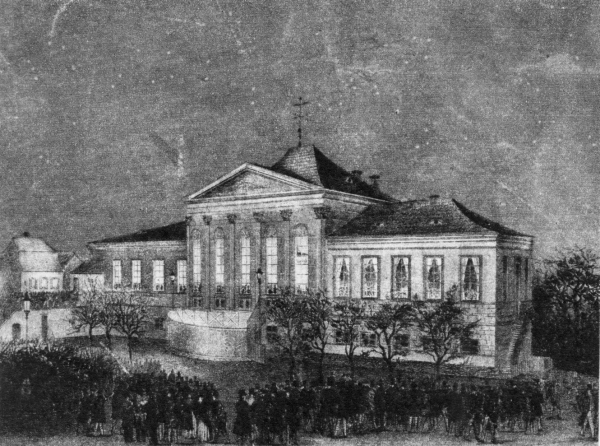 Shromáždění představitelů českého národa dne 11. března 1848 ve Svatováclavských lázních v Praze předložilo národní a politické požadavky